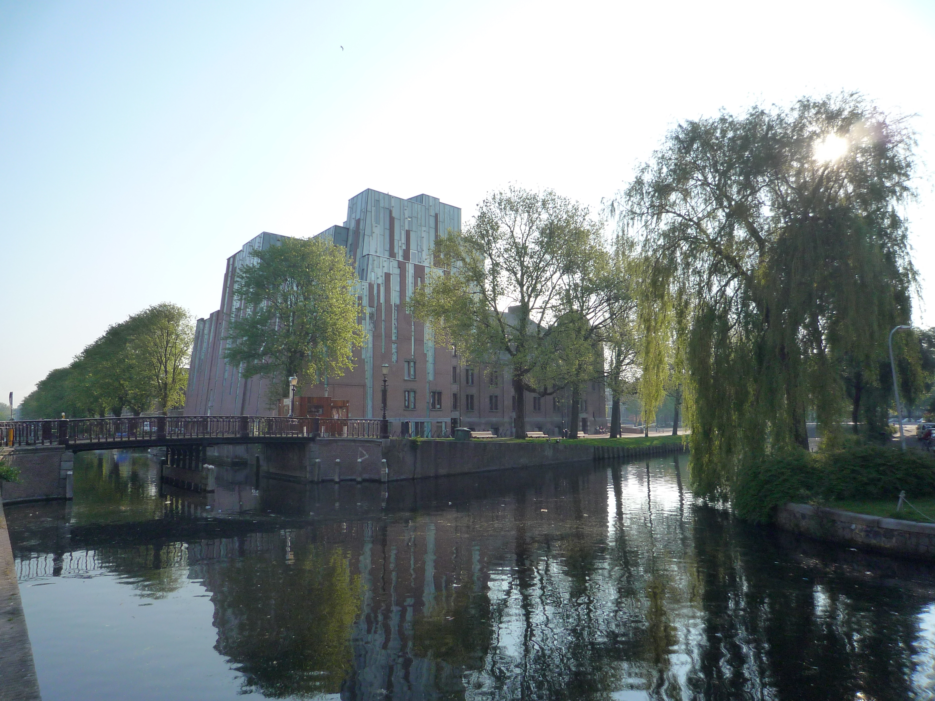 Stadsschouwburg Haarlem